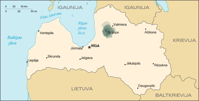 Idumejas novada teritorijas variācijas pēc dažādām vēstures kartēm.